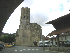 Place de la Mairie - 32120 Monfort